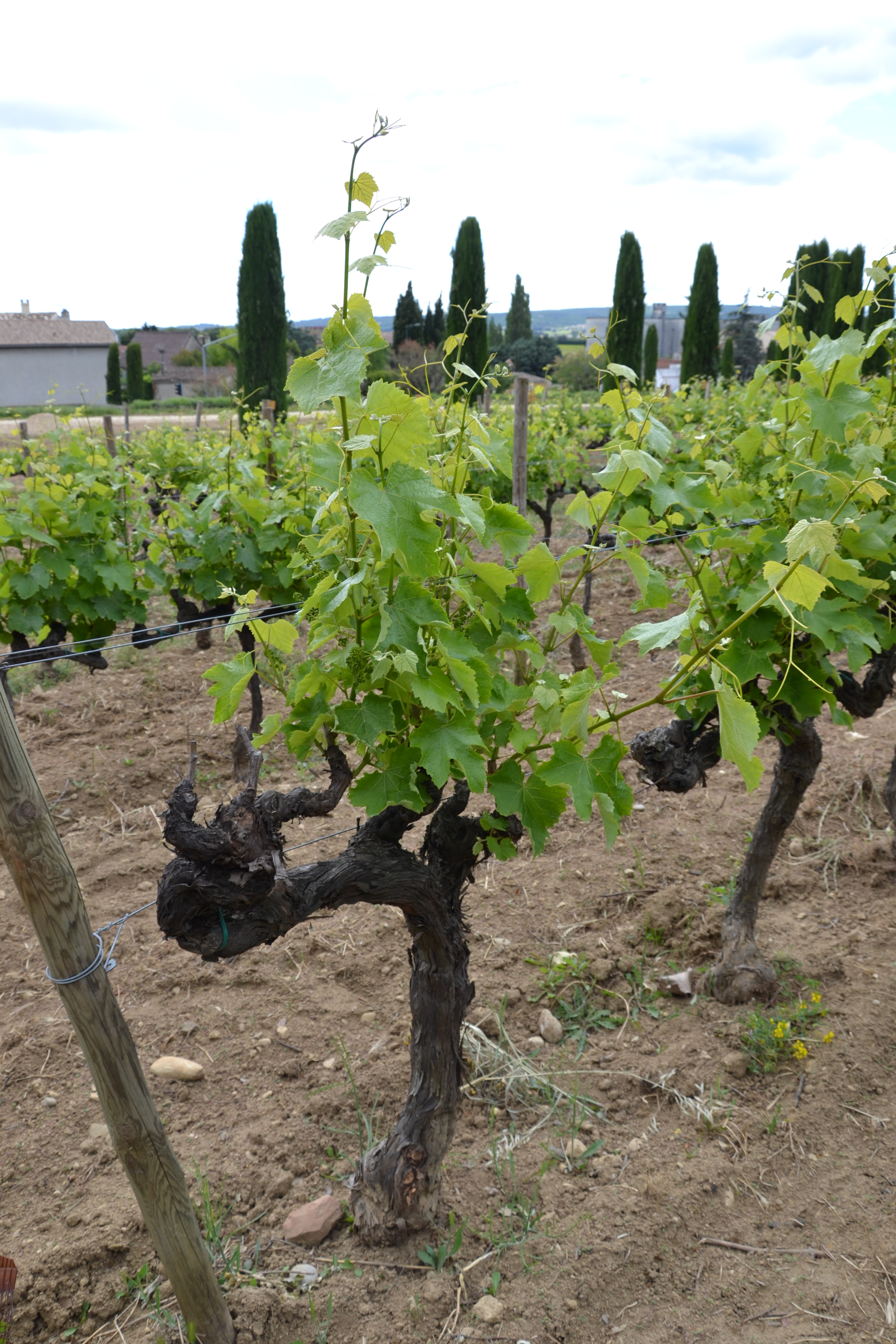 vigne de cépage Colombard